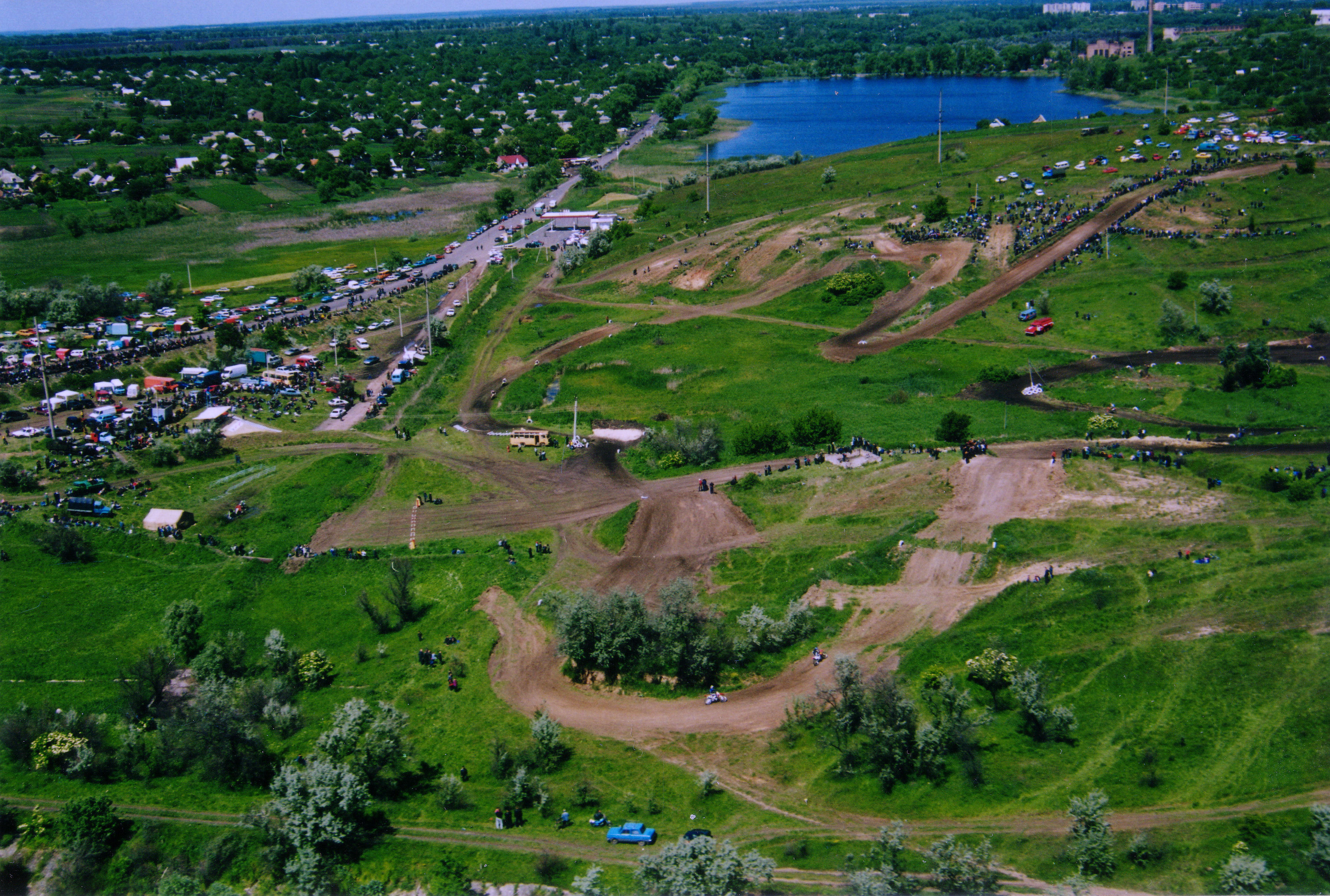 Траса Вербова Лоза. Фото з вертольота. 15.06.2006